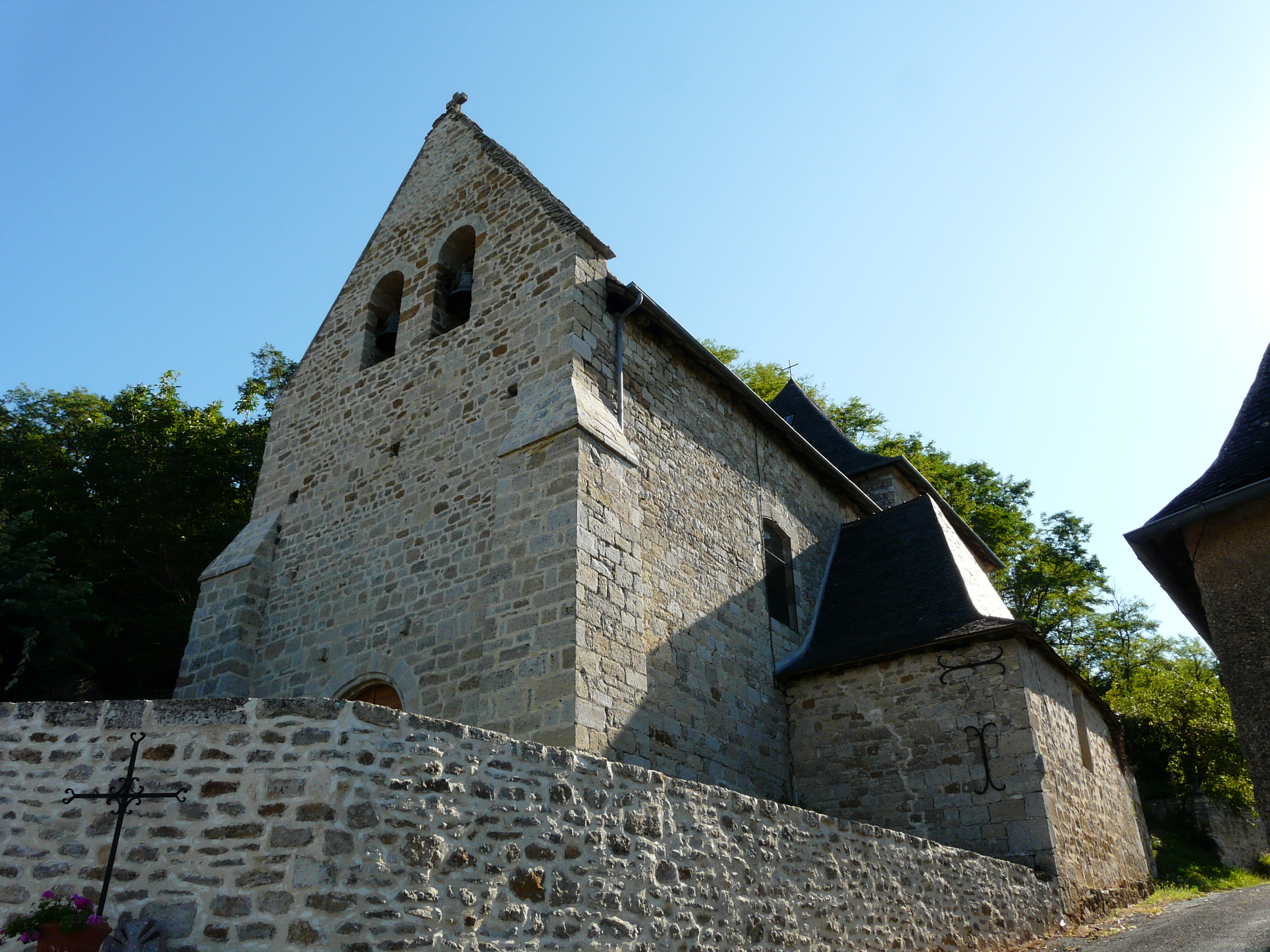 L'église de Grèzes, Dordogne, France.